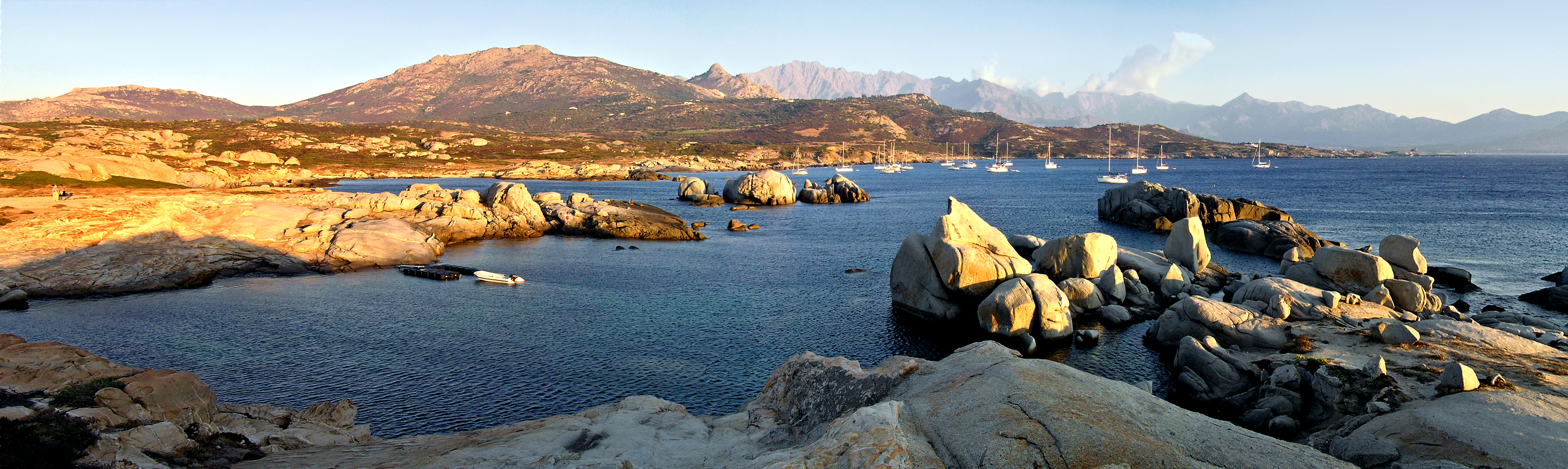 Lumio (Corse) - Panorama de la baie d'Algajo depuis Spano